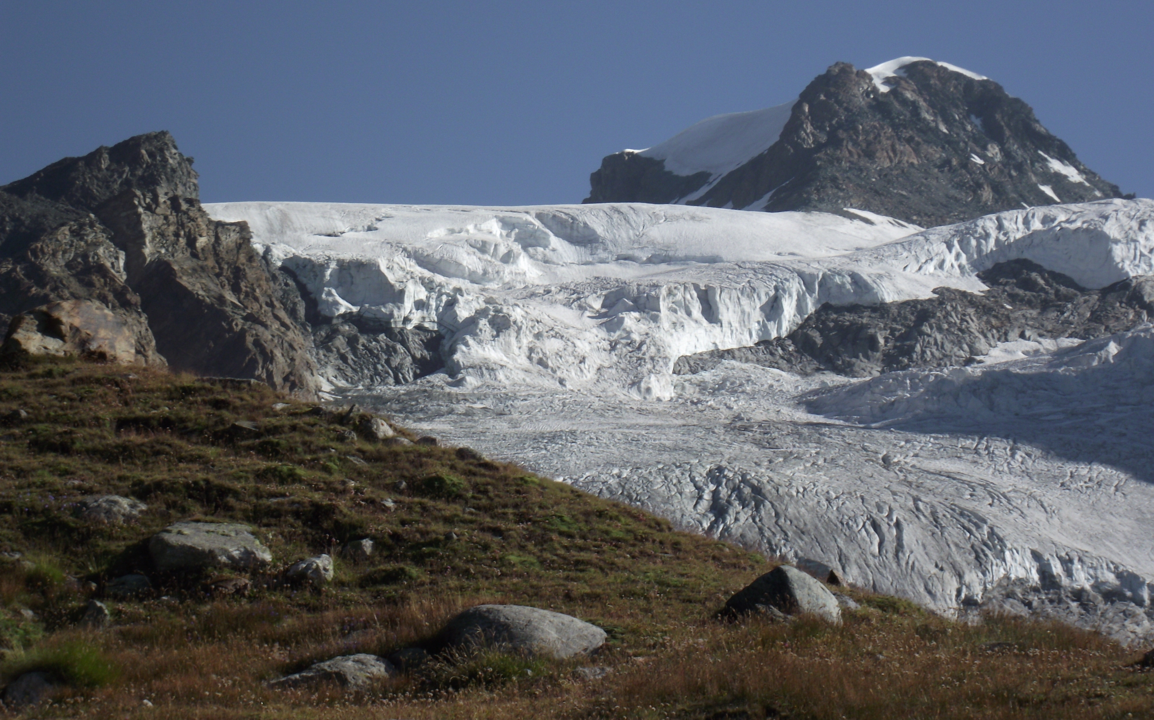 Il Polluce visto salendo al Rif. Mezzalama This is a photo of a monument which is part of cultural heritage of Italy.